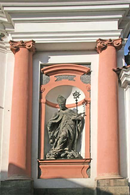 Barokní edikula se sochou svatého Prokopa na stěně kostela Sv. Jana Nepomuckého v Kutné Hoře autor:Zp